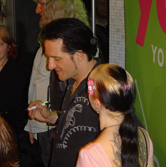 Summary Bildbeschreibung: Das Bild zeigt Bela B. beim Autogramme geben im Glaskasten der Hochschule Darmstadt nach einer Promotion-Veranstaltung für sein Album "Bingo" Quelle: selbst fotografiert Fotograf/Zeichner: Julian Guddat (Benutzer:Schluddi, eigenes Foto) Datum: 8.5.2006